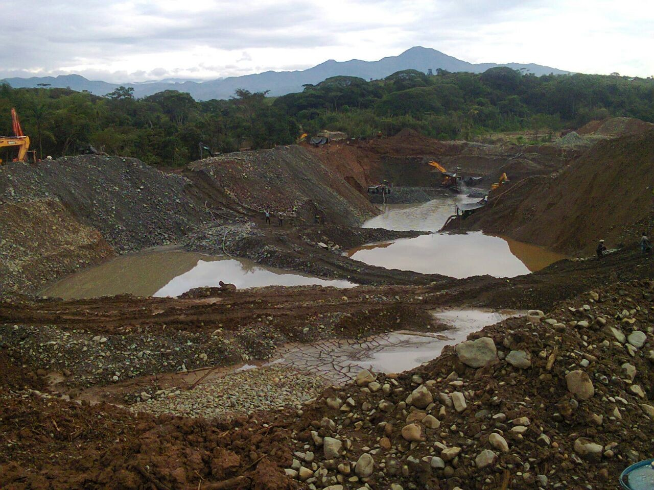 Consecuancia de la minería ilegal en Quilichao